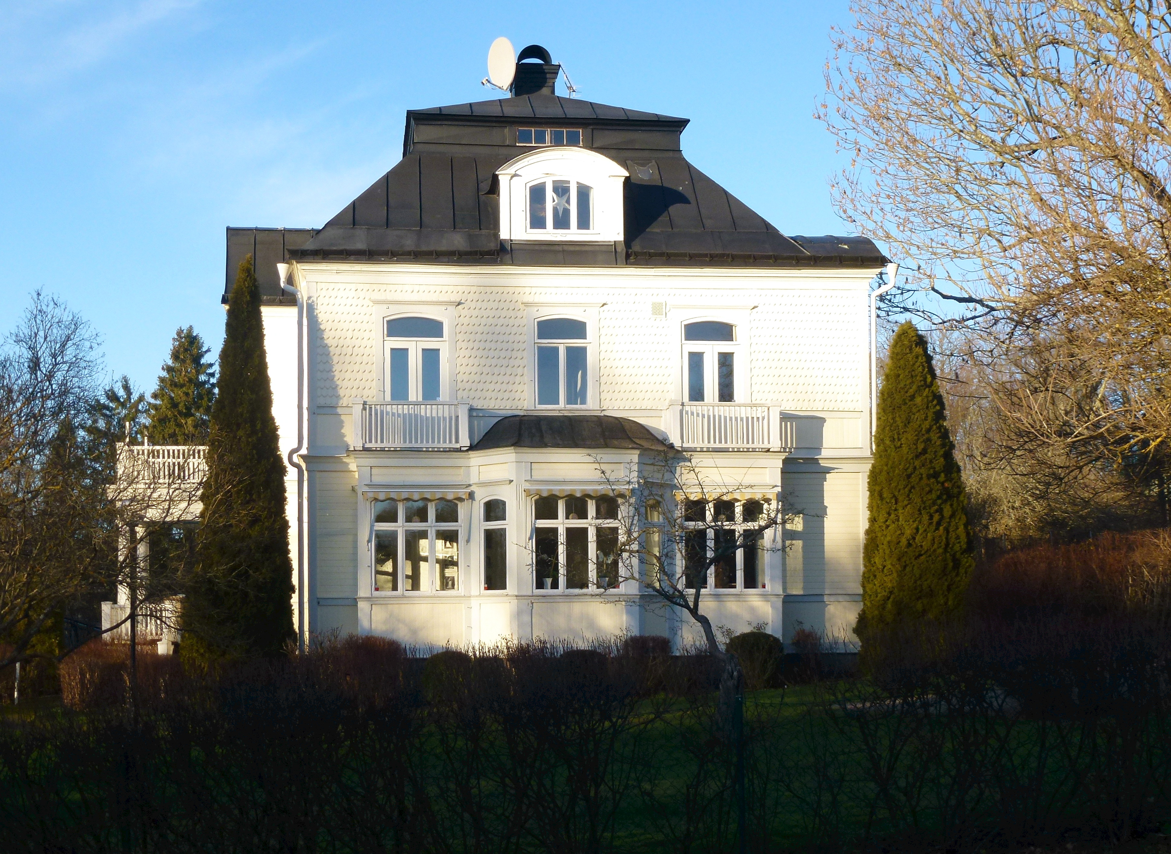 Den så kallade Prinsvillan vid Germaniavägen 14, Djursholm